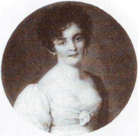 принцесса Иоганна-Екатерина Петровна Бирон, герцогиня д'Арченца. Ioanna-Catherine Biron, duchess d'Acerenza. 3d daugher of Peter Biron. С миниатюры, принадлежавшей графу Палену